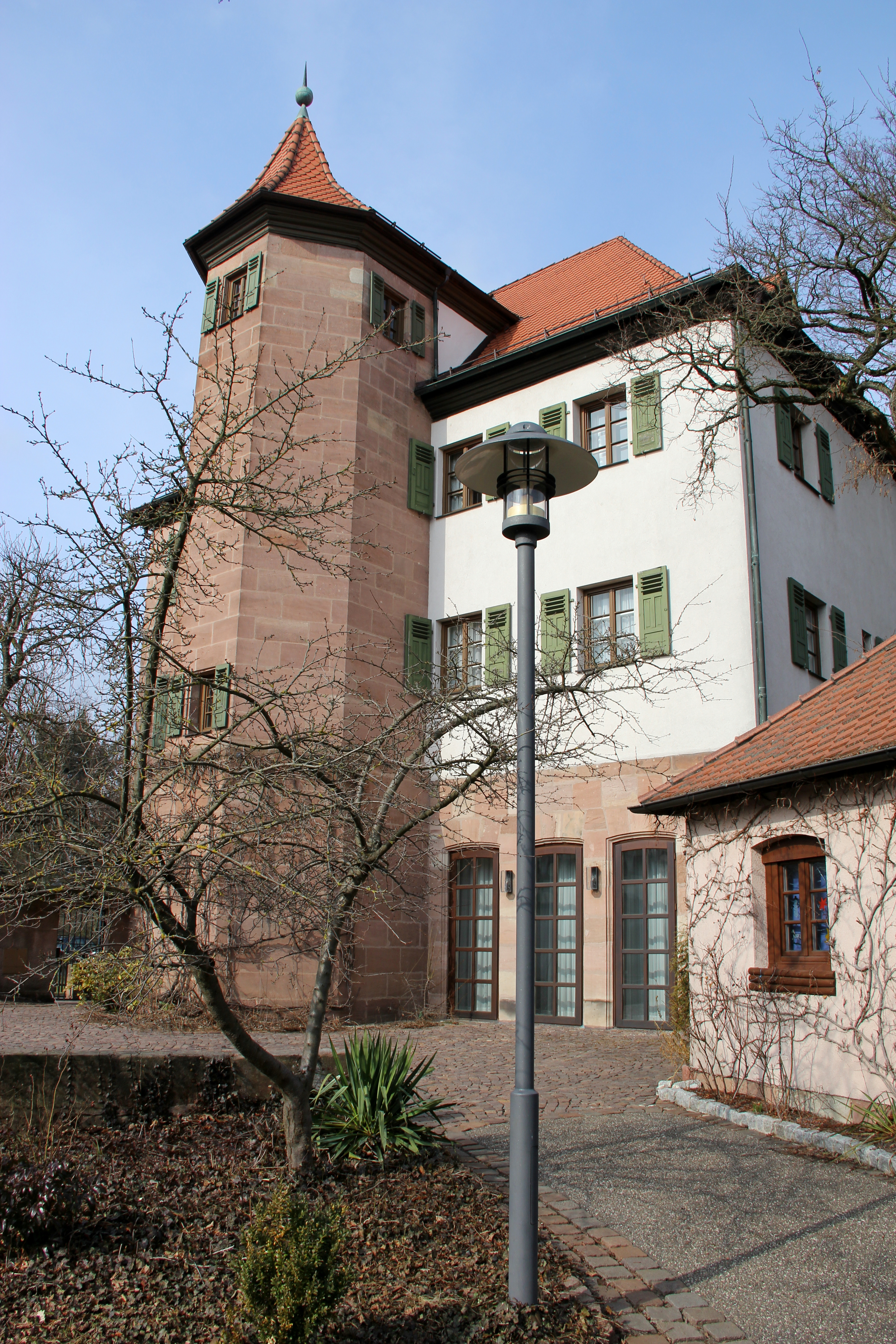 Schloss Schwaig